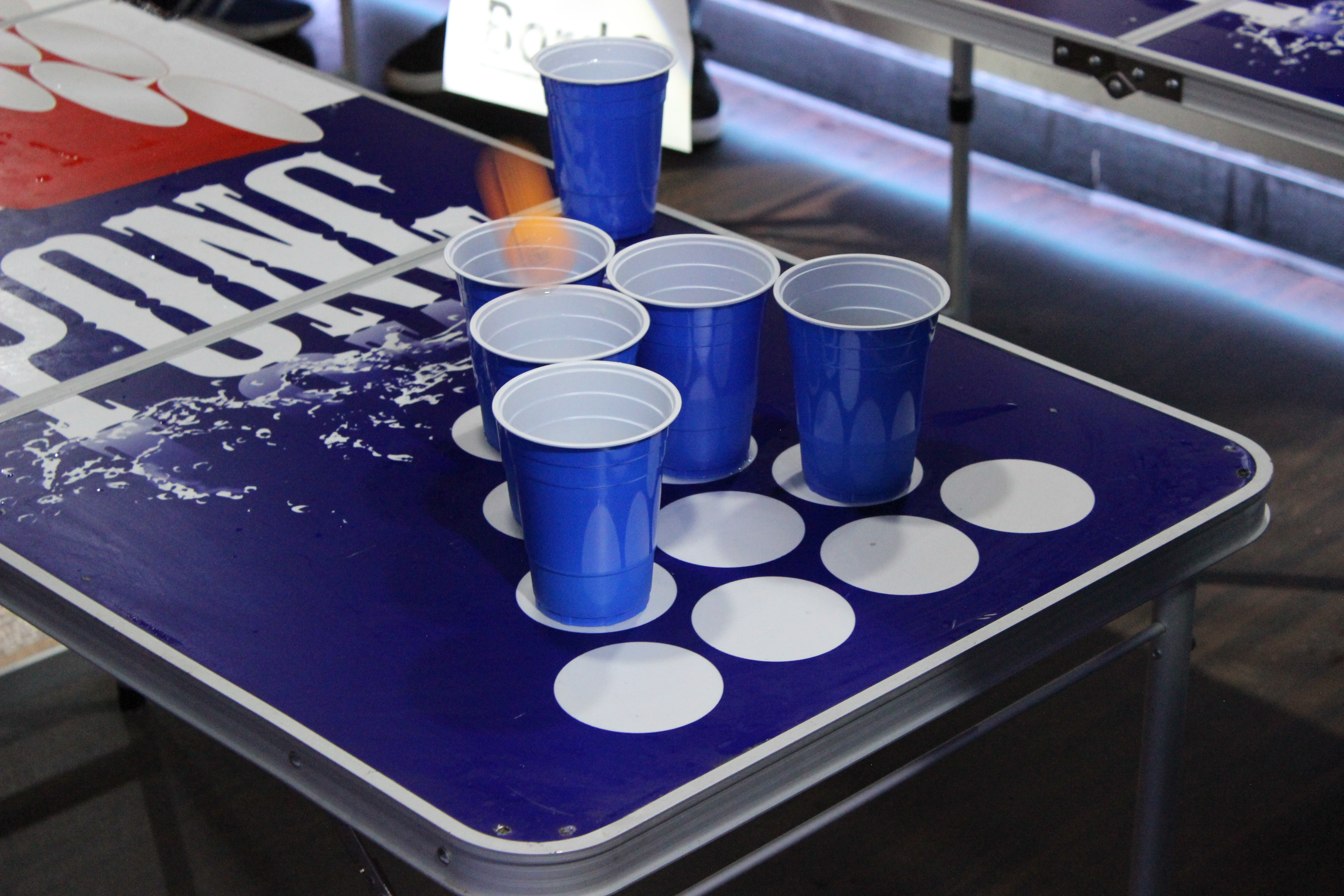 Til finalerne af DSOBP 2019.